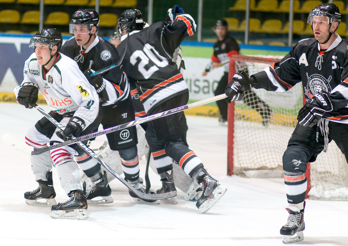 Eissporthalle Frankfurt: Herner EV vs. Löwen Frankfurt 1b; Oberliga West, 7. November 2014